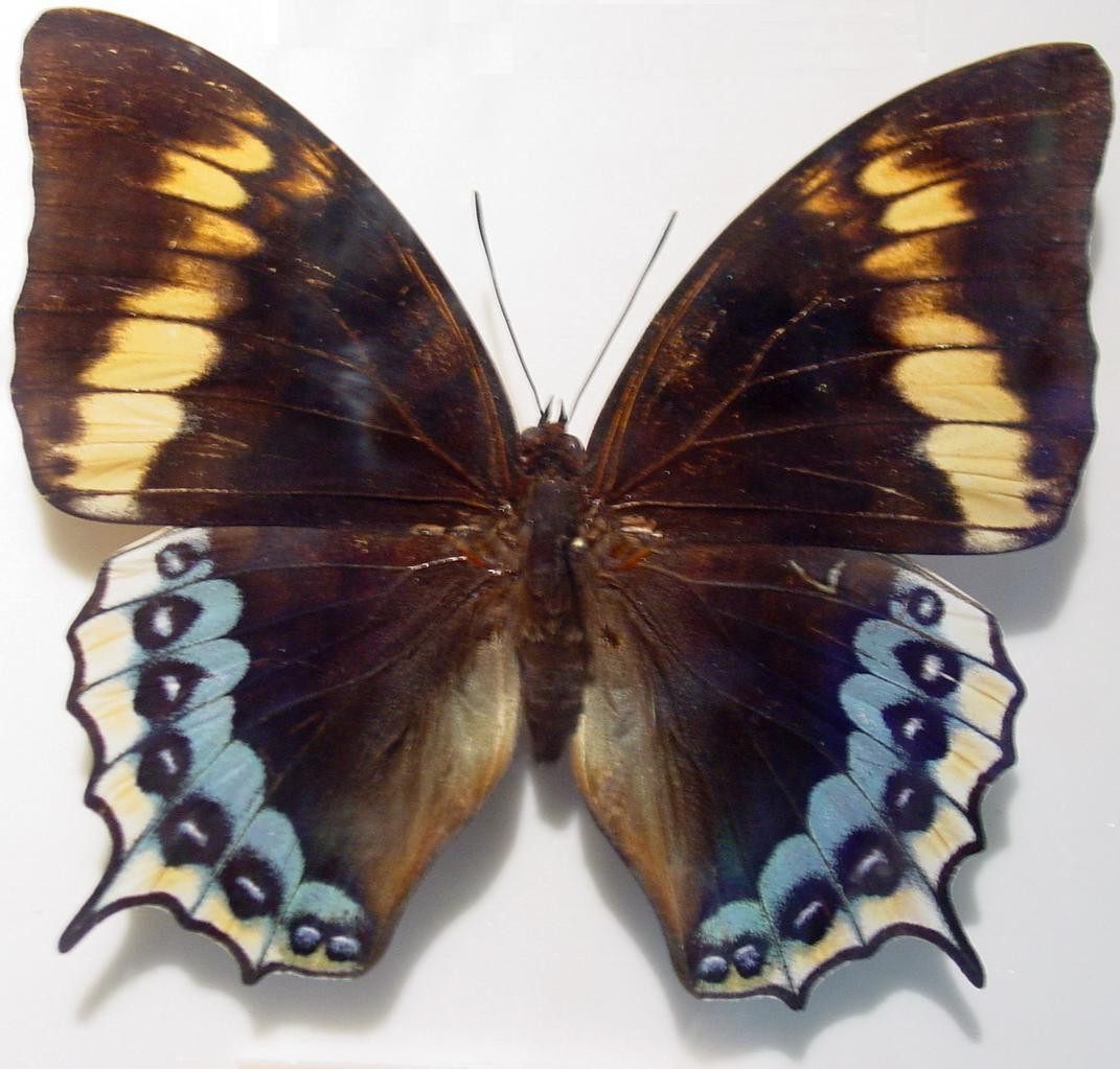 self made